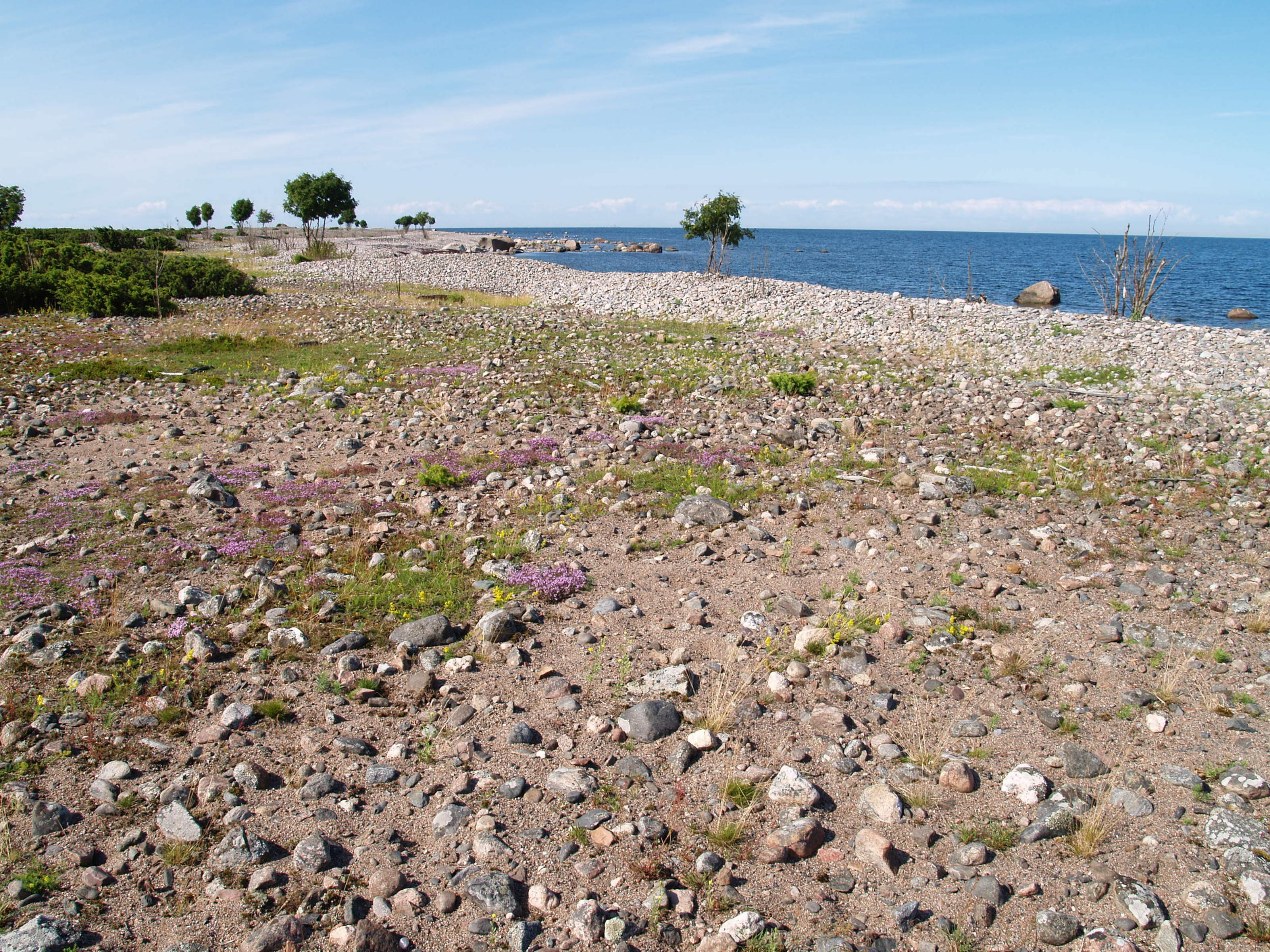 Aksi saar.